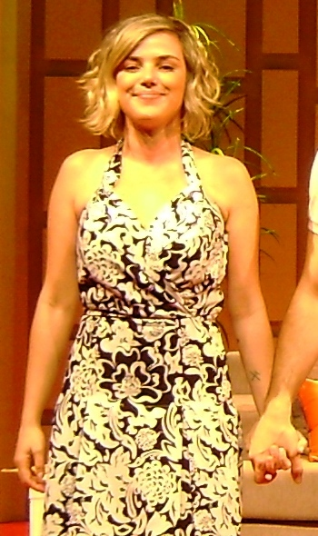 Nathália Rodrigues, atriz brasileira, após a apresentação da peça "Vamos?", em São Paulo.